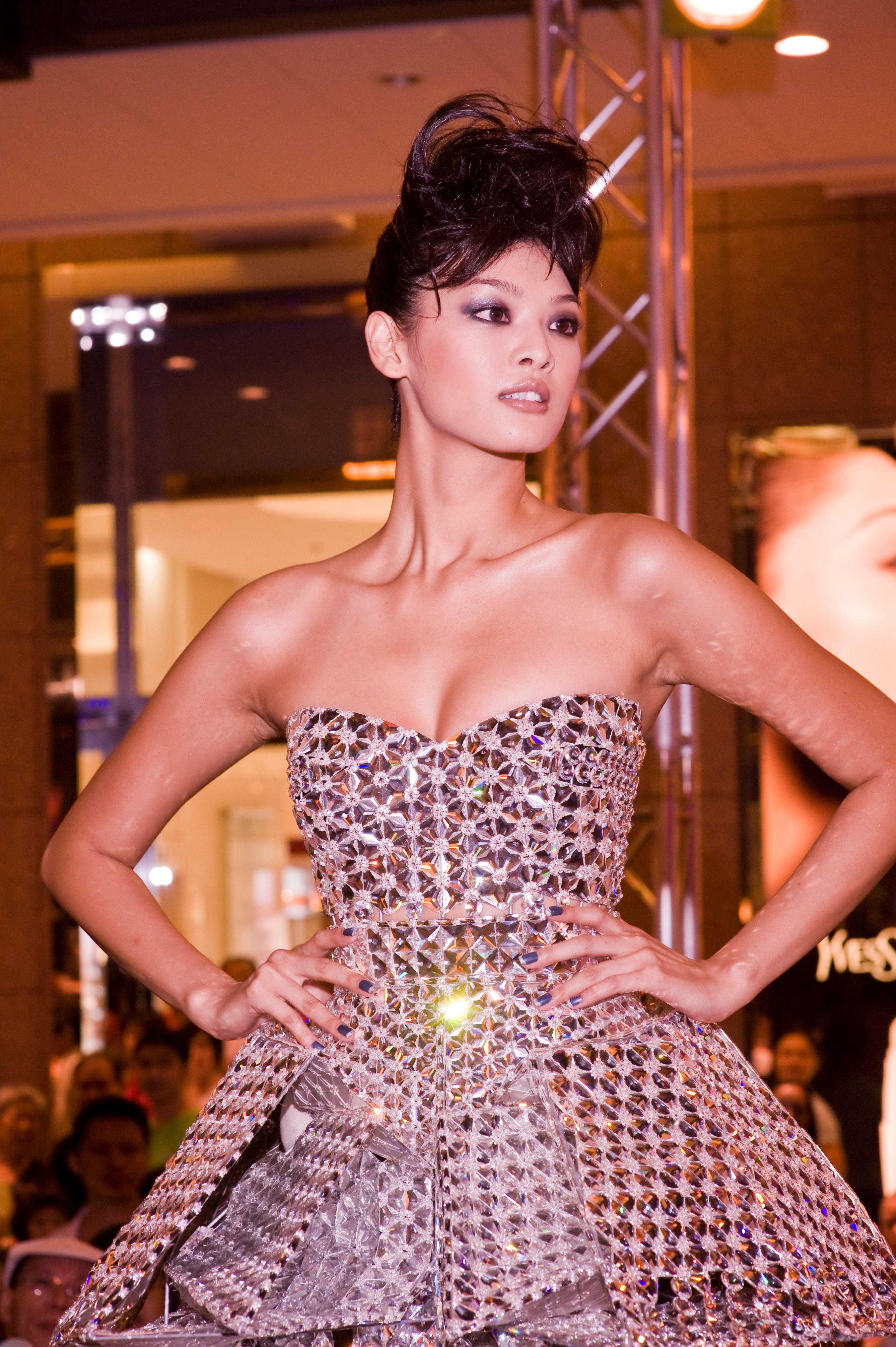 林嘉綺參與2008年台北時尚週走秀Bân-lâm-gú: Lîm Ka-khí tsham-ú 2008-nî Tâi-pak sî-siōng-tsiu tsáu-siù. 林嘉綺參與2008年台北時尚週走秀。